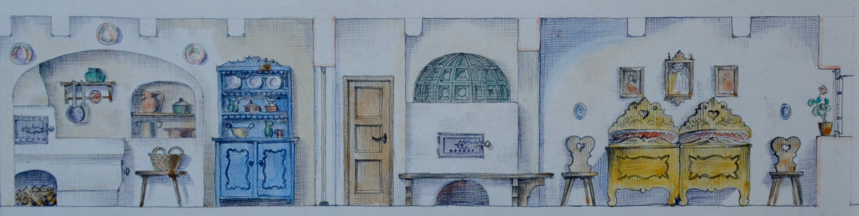 A piros bugyelláris (Pásztor Béla, 1938) - Sőrés Imre díszletterve.